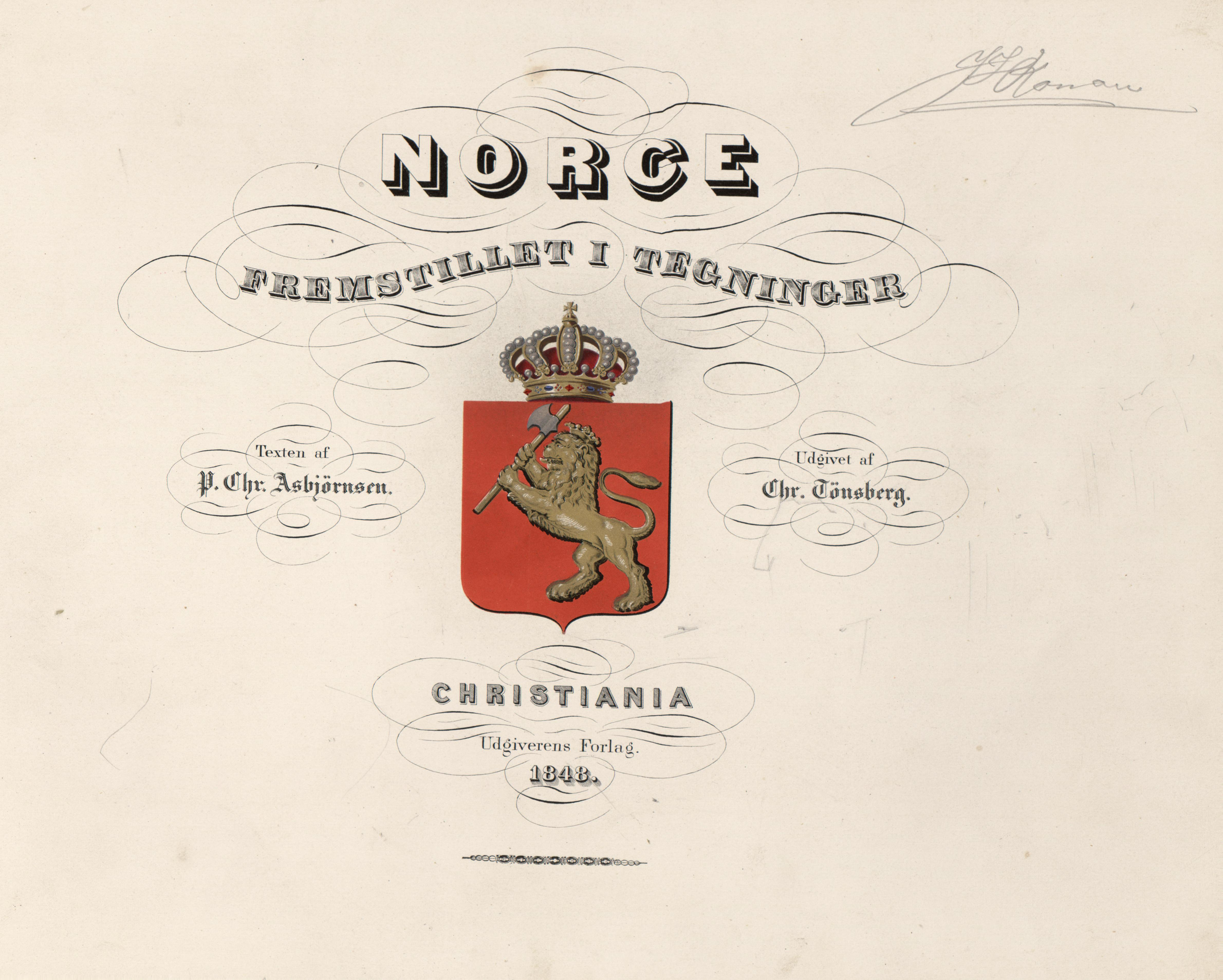 Illustrasjon hentet fra boken "Norge fremstillet i Tegninger" av Asbjørnsen, P.Chr. og utgitt av Chr. Tønsberg (no, 1848)